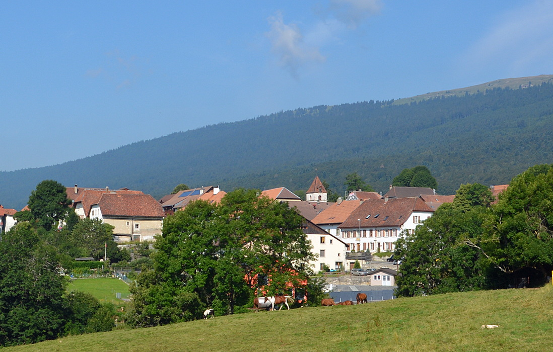 Das Dorf Nods, Kanton Bern